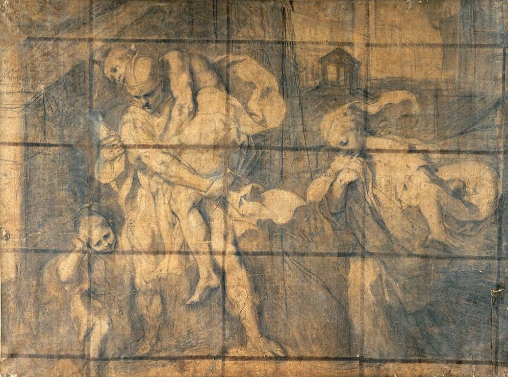 Fuga da Troia, cartone preparatorio di un dipinto